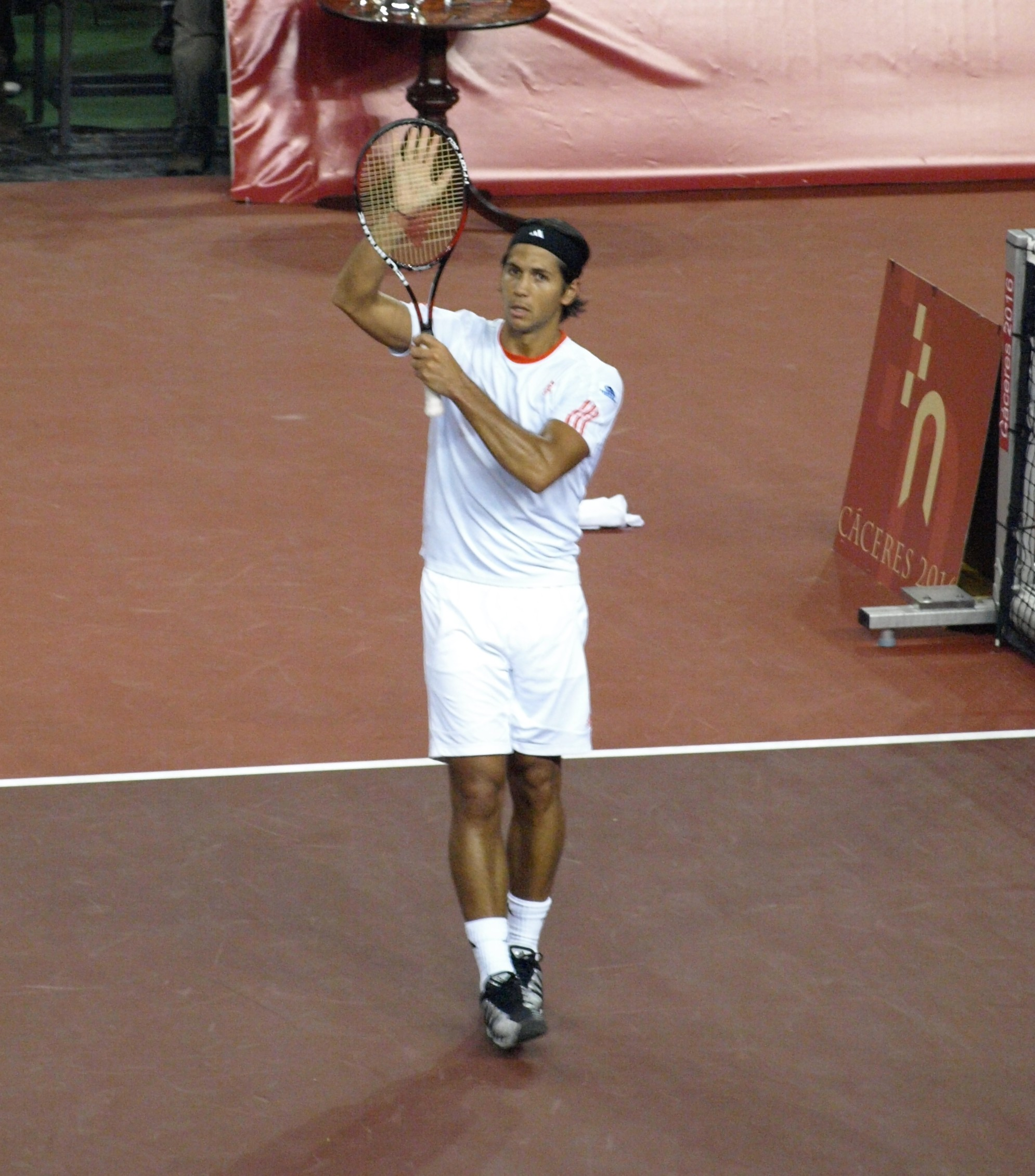 Fernando Verdasco saludando al público de Cáceres tras su victoria en el Master Nacional de Tenis en Diciembre de 2007